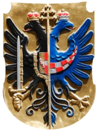 Wappen Erzbistum Ljubljana - Laibach - Slovenien